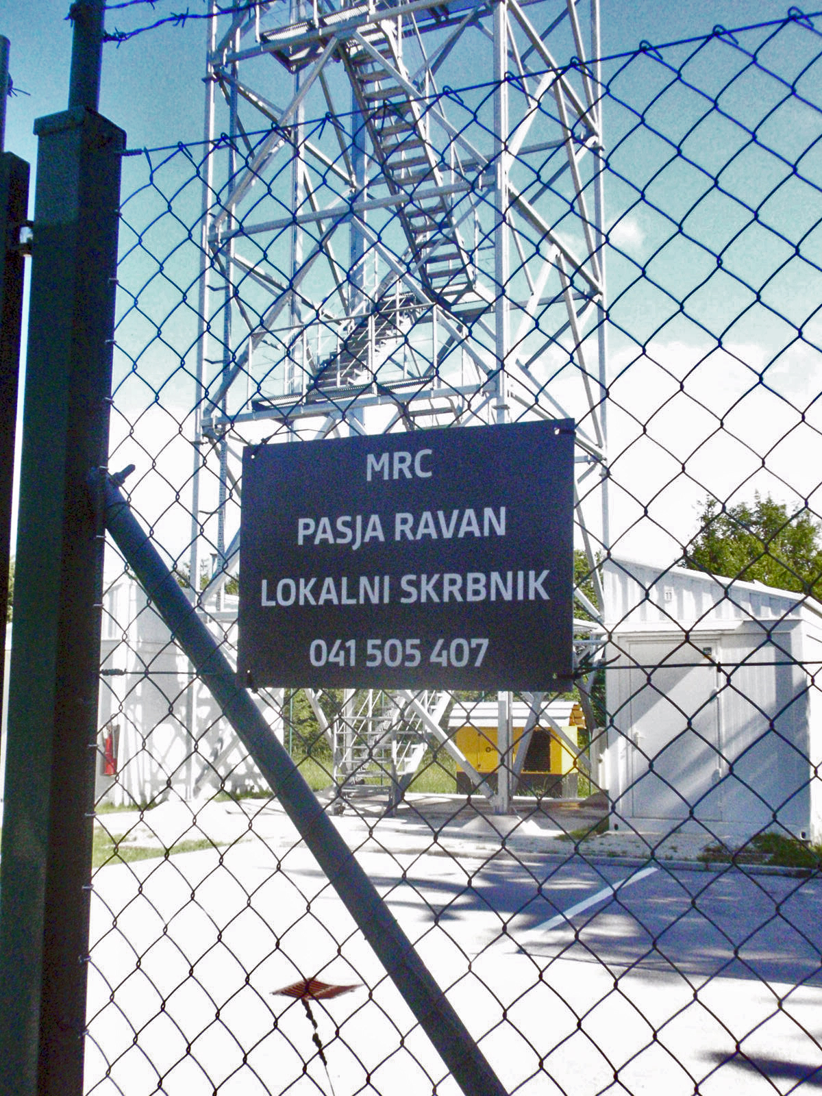 Tabla o lokalnem skrbniku objekta.